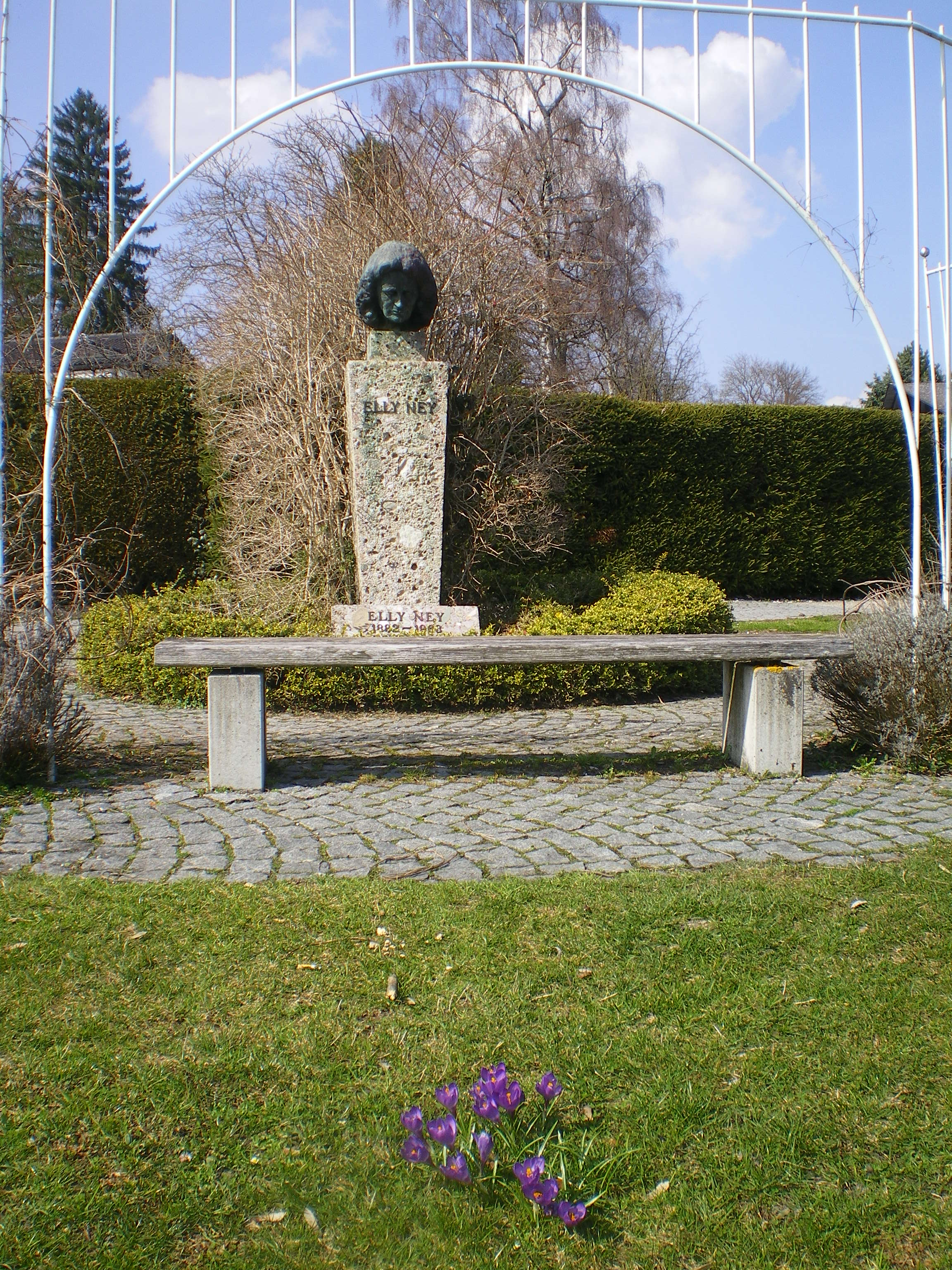 Elly Ney Denkmal in Tutzing an der Brahms-Promenade